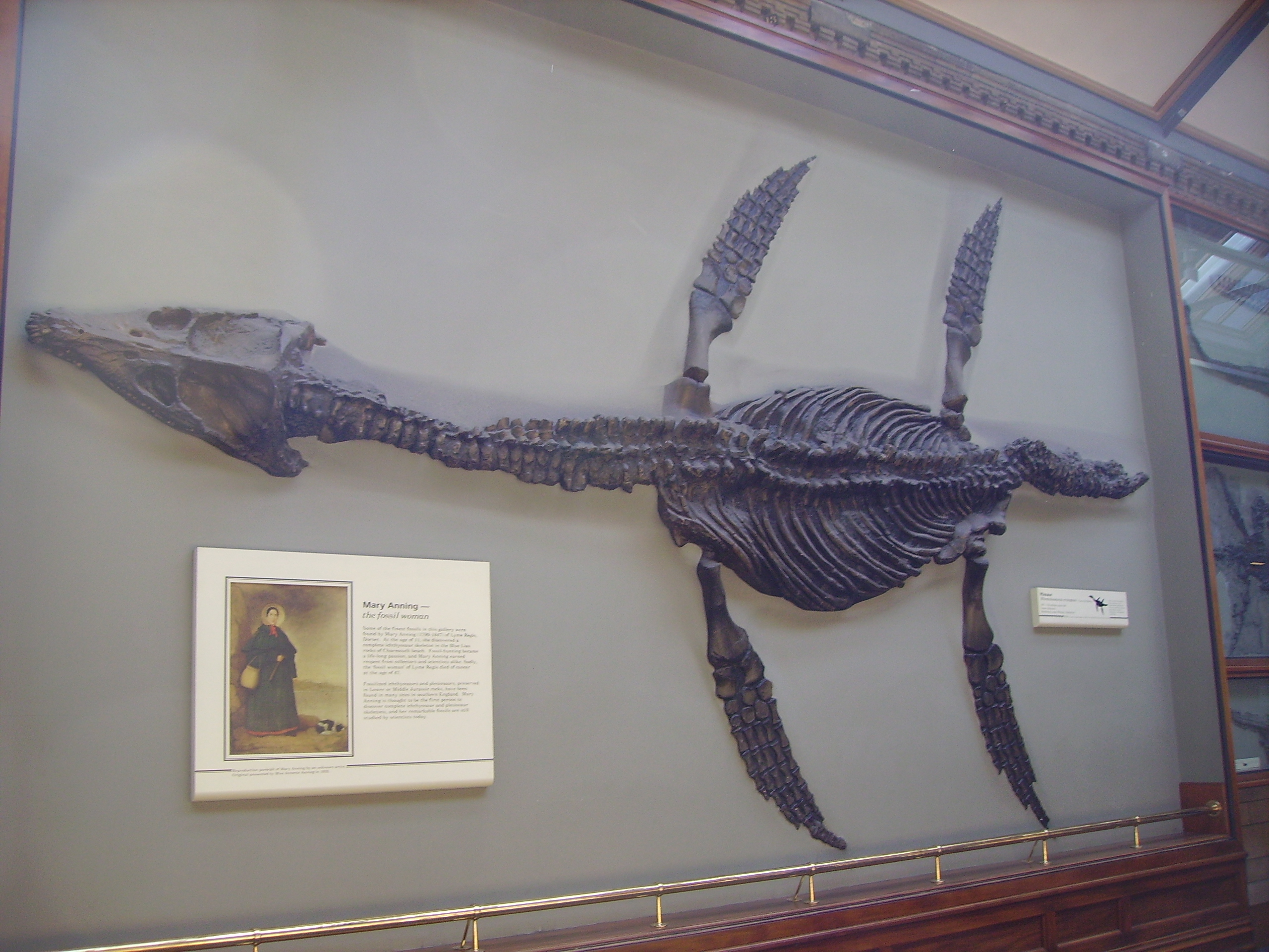 Rhomaleosaurus cramptoni